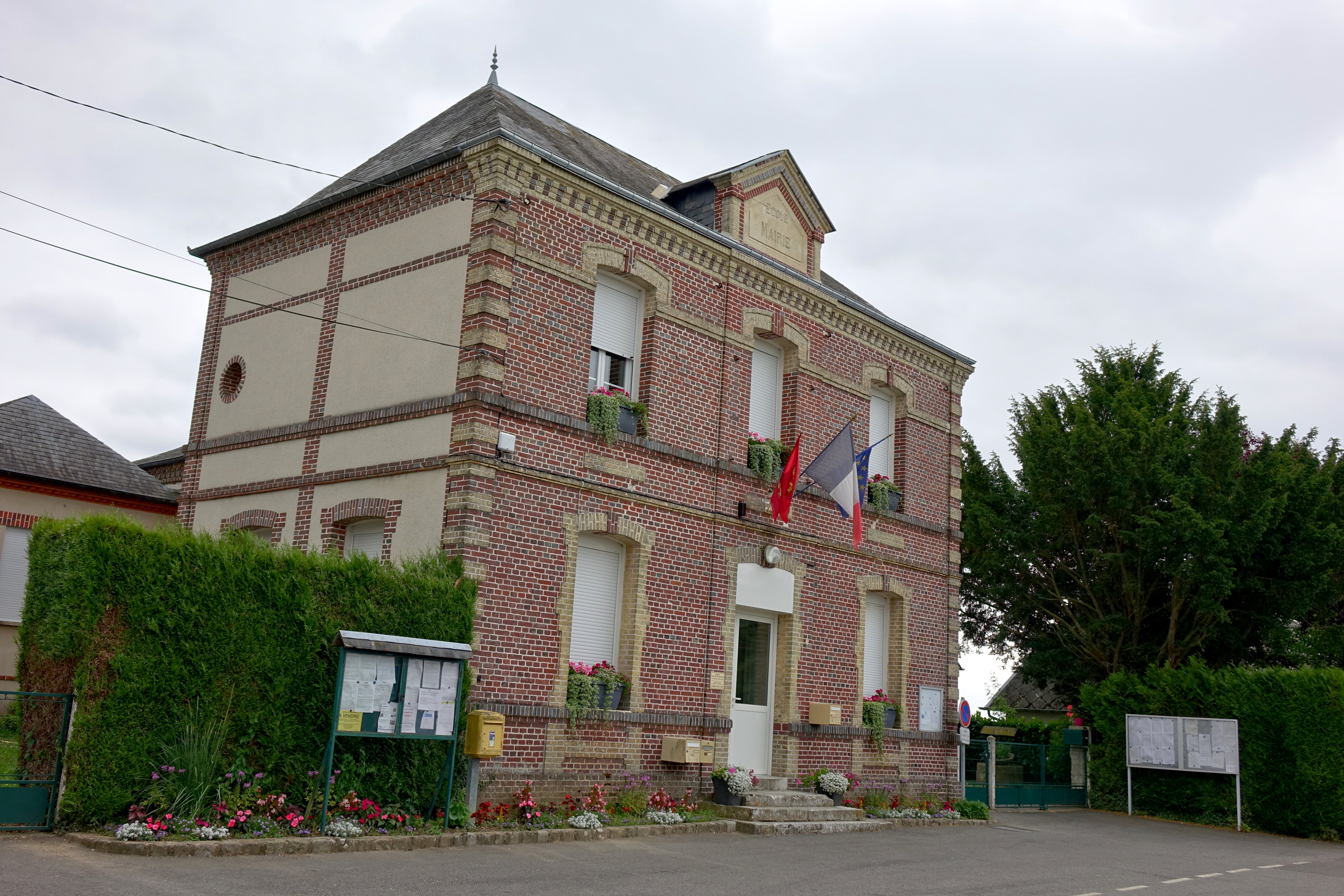 Mairie de Saint-Paul-de-Fourques, Eure, France